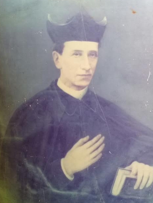 Retrato del presbítero don José Fortunato Berríos y Rojas.